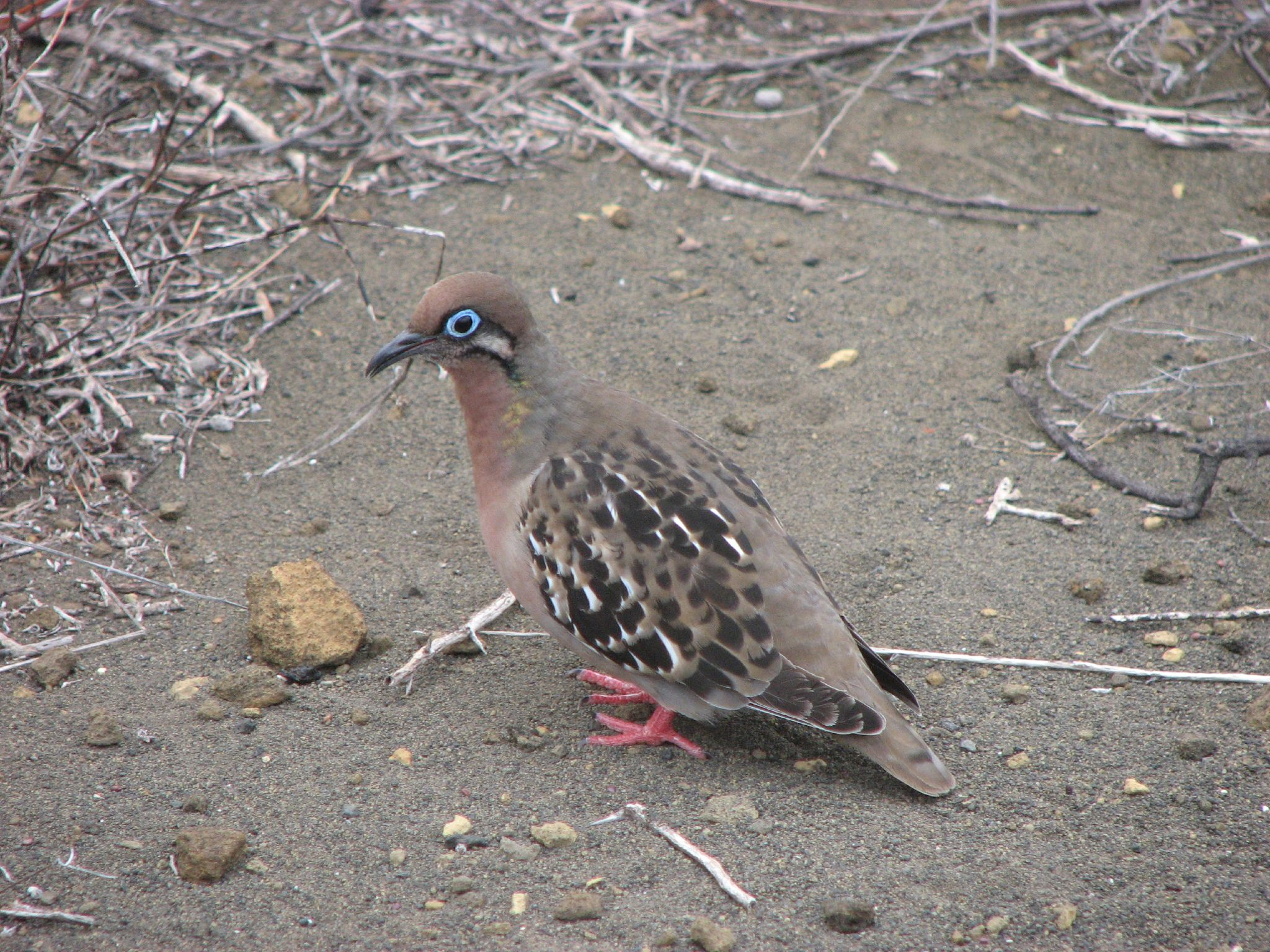 Galapagos Dove Zenaida galapagoensis